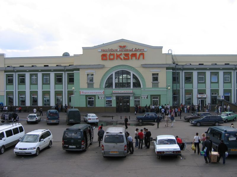 Железнодорожный вокзал Улан-Удэ